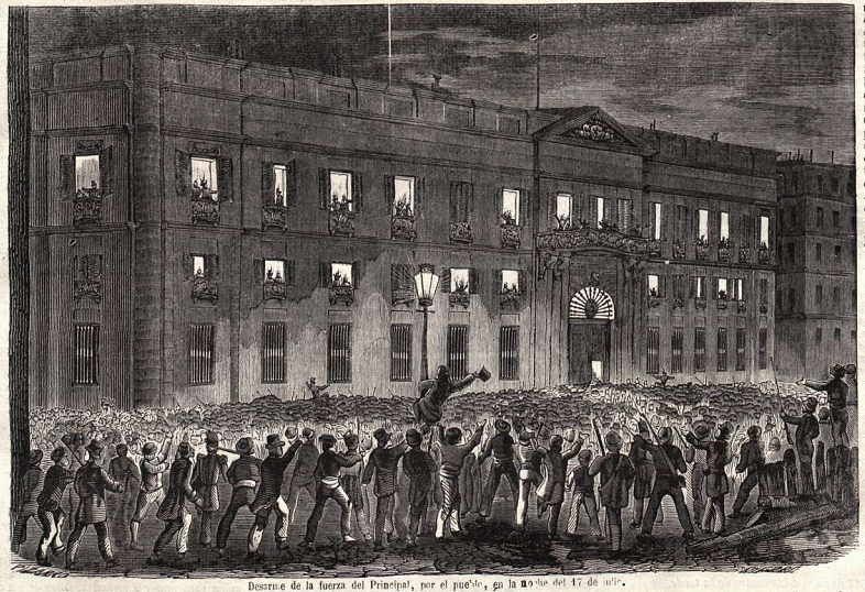 Desarme de la fuerza del Principal, por el pueblo, en la noche del 17 de julio, en la revista española La Ilustración.